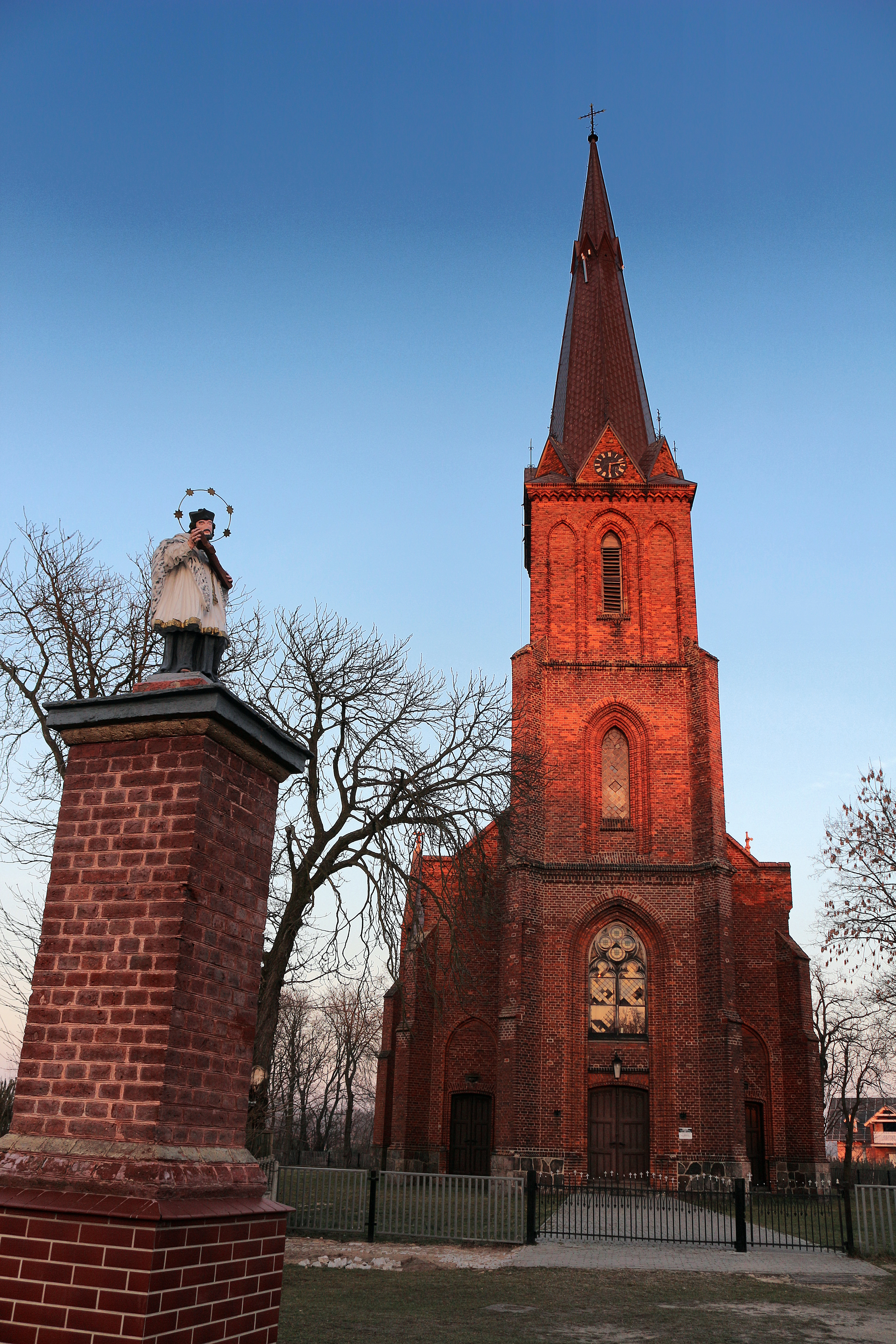 Łysiny - rzymskokatolicki kościół parafialny p.w. Matki Boskiej Bolesnej, 2 poł. XIX